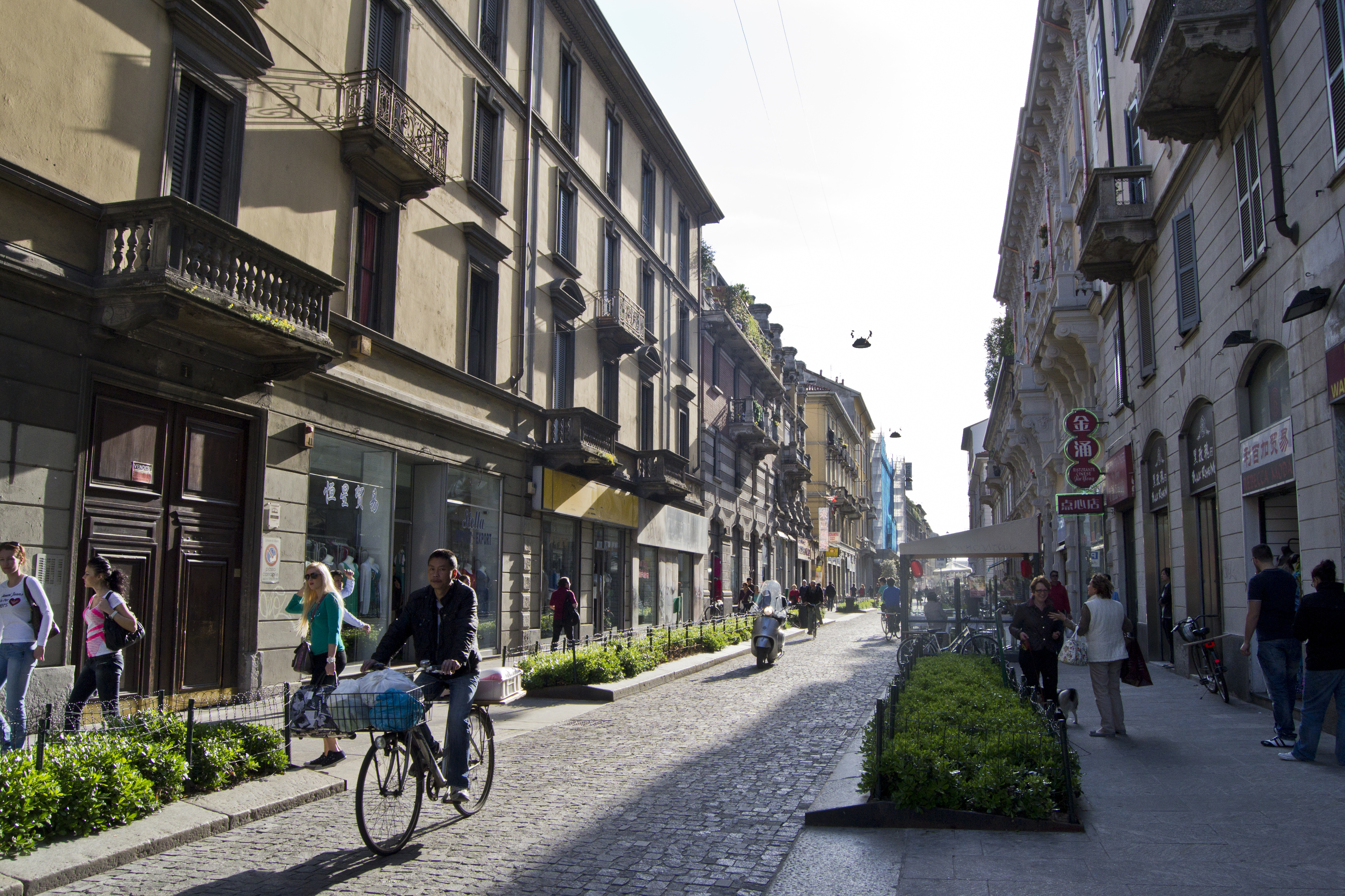 Via Paolo Sarpi, Milano. Maggio 2012